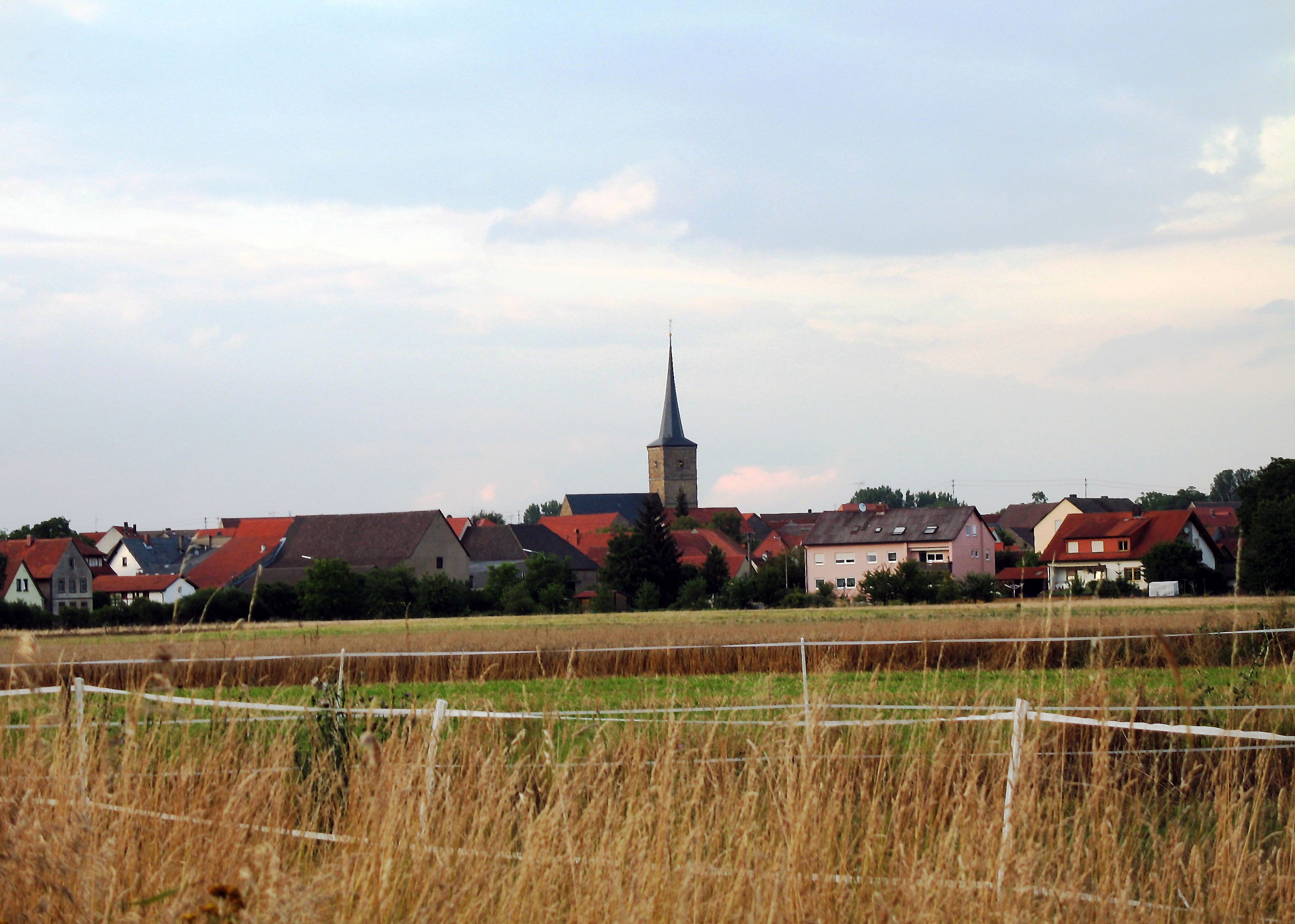 Blick auf Ebing, Deutschland mit Kirche.